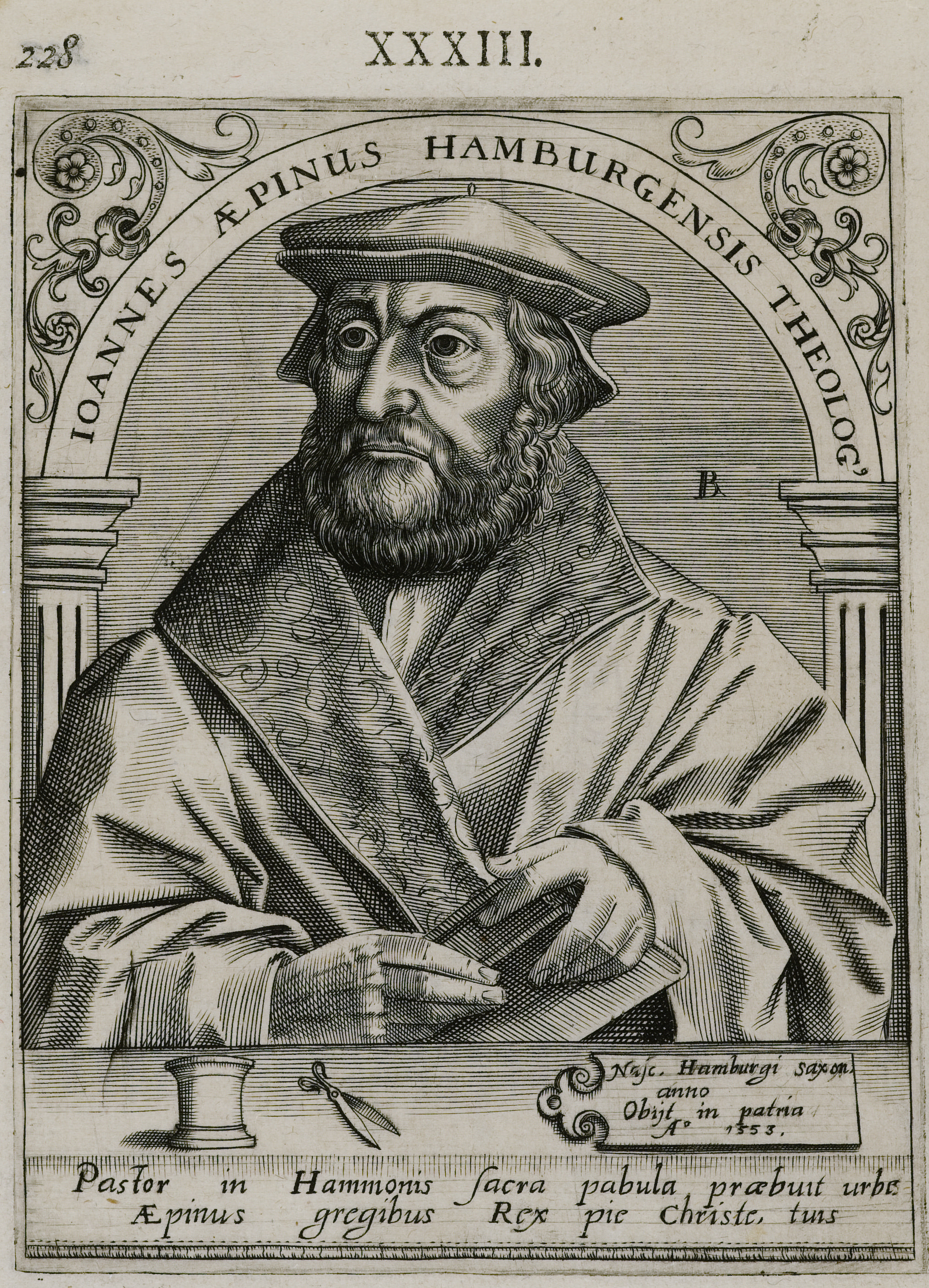 Ioannes Aepinus Hamburgensis Theolog[us]